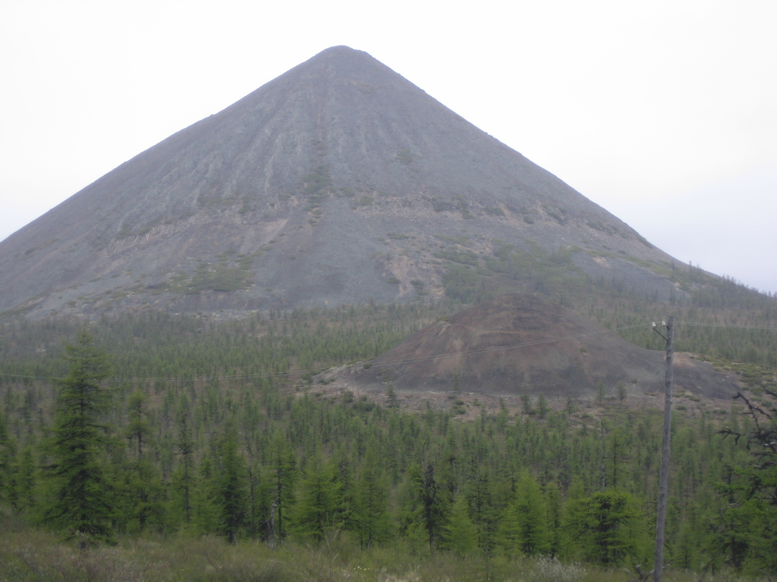 View on Ken mountain